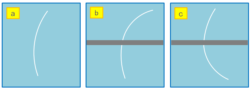 霧箱で観測した磁場中の粒子の飛跡。(b)、(c)は霧箱内に鉛板を置いた場合。